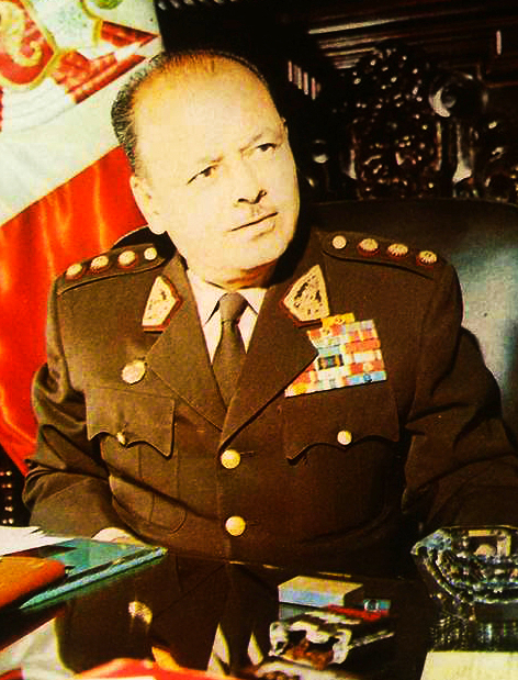 Juan F. Velasco Alvarado, retratro oficial del Gobierno